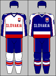 Slovak national team jerseys from Winter Olympic Games 1994